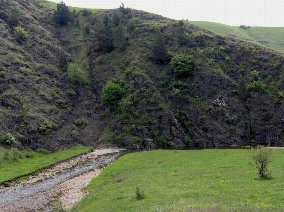 Haşdate River